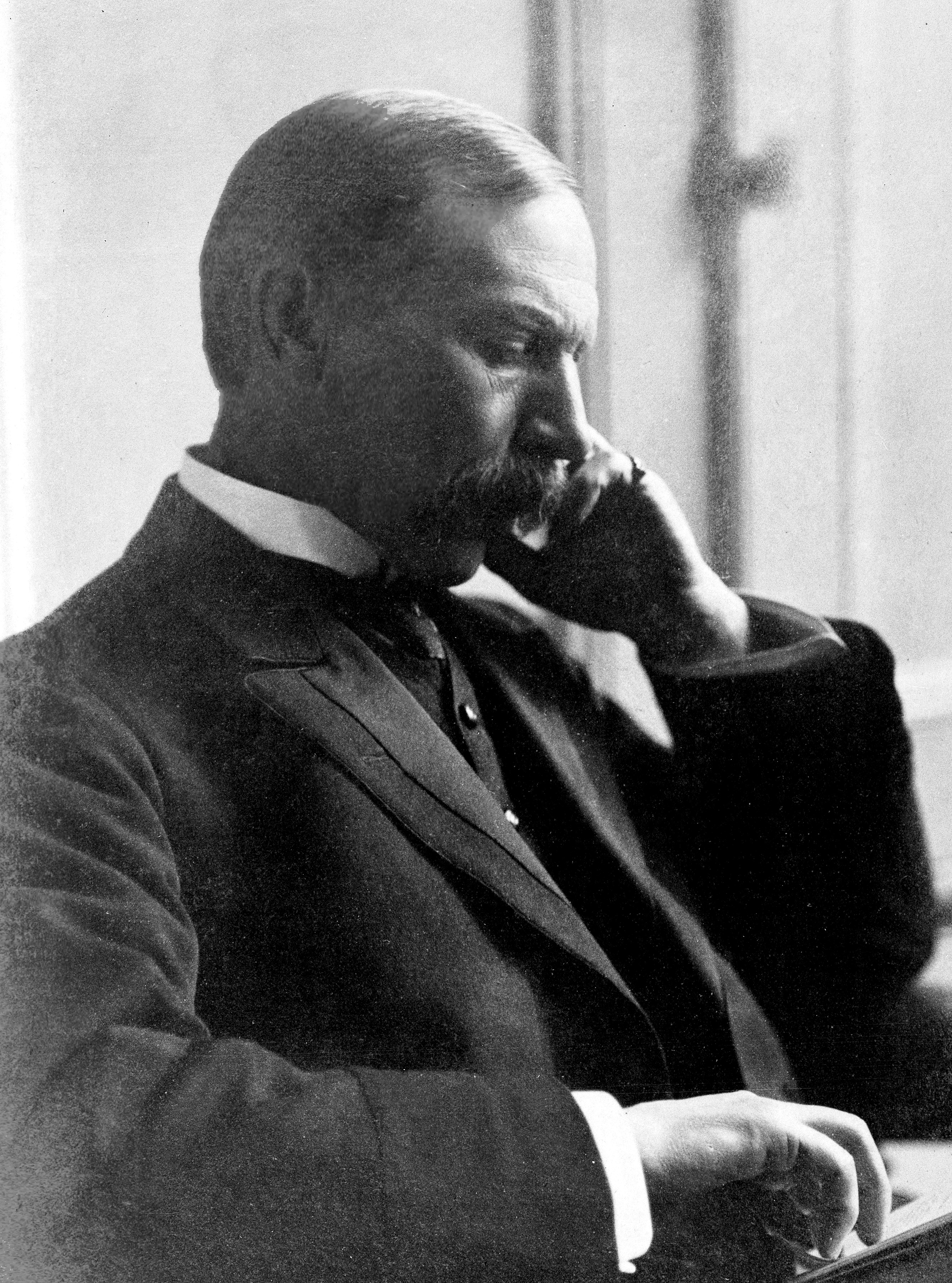 Sir Harry Gilbert Barling, 1st Baronet